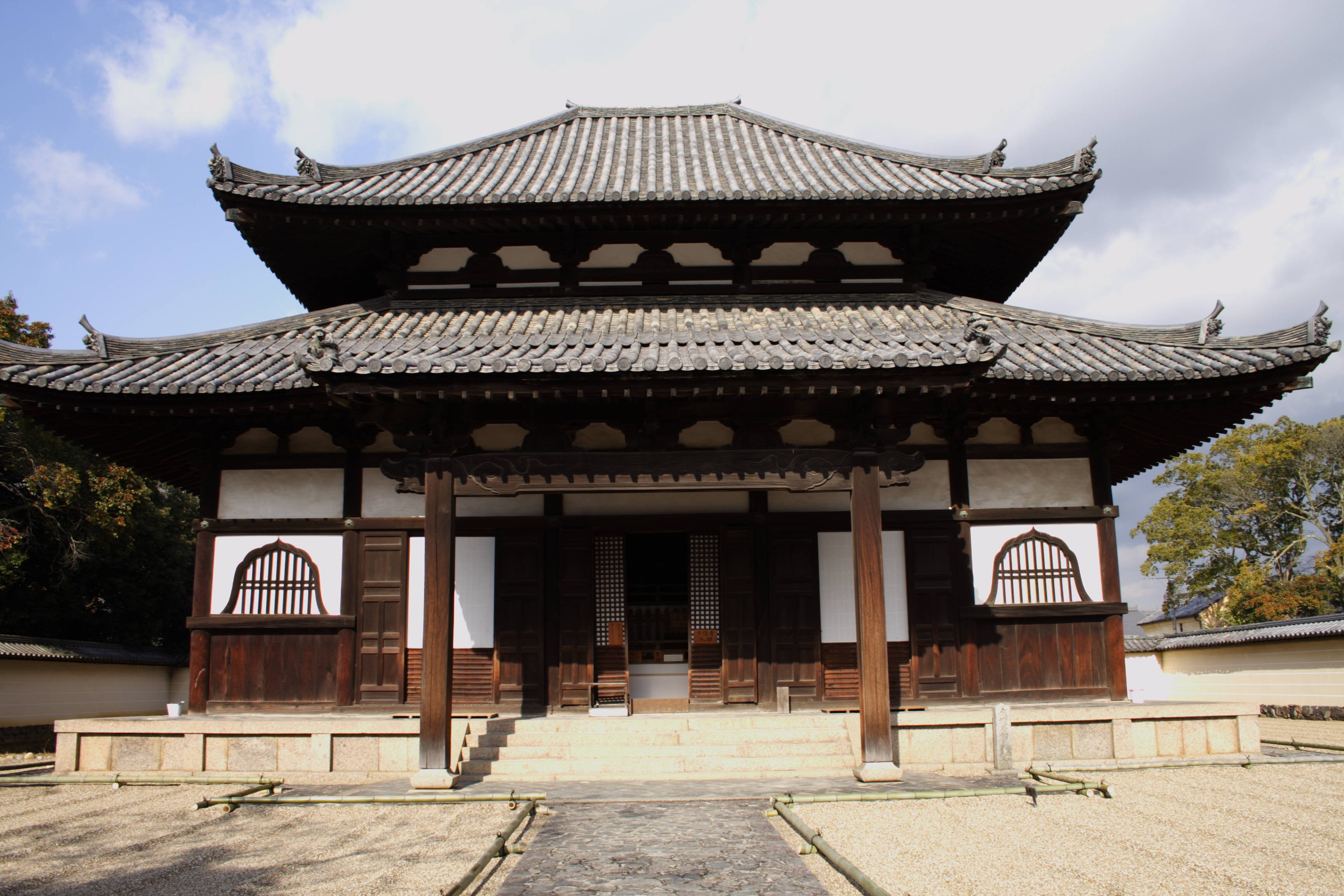 Kaidan-in in Todaiji/東大寺 戒壇院